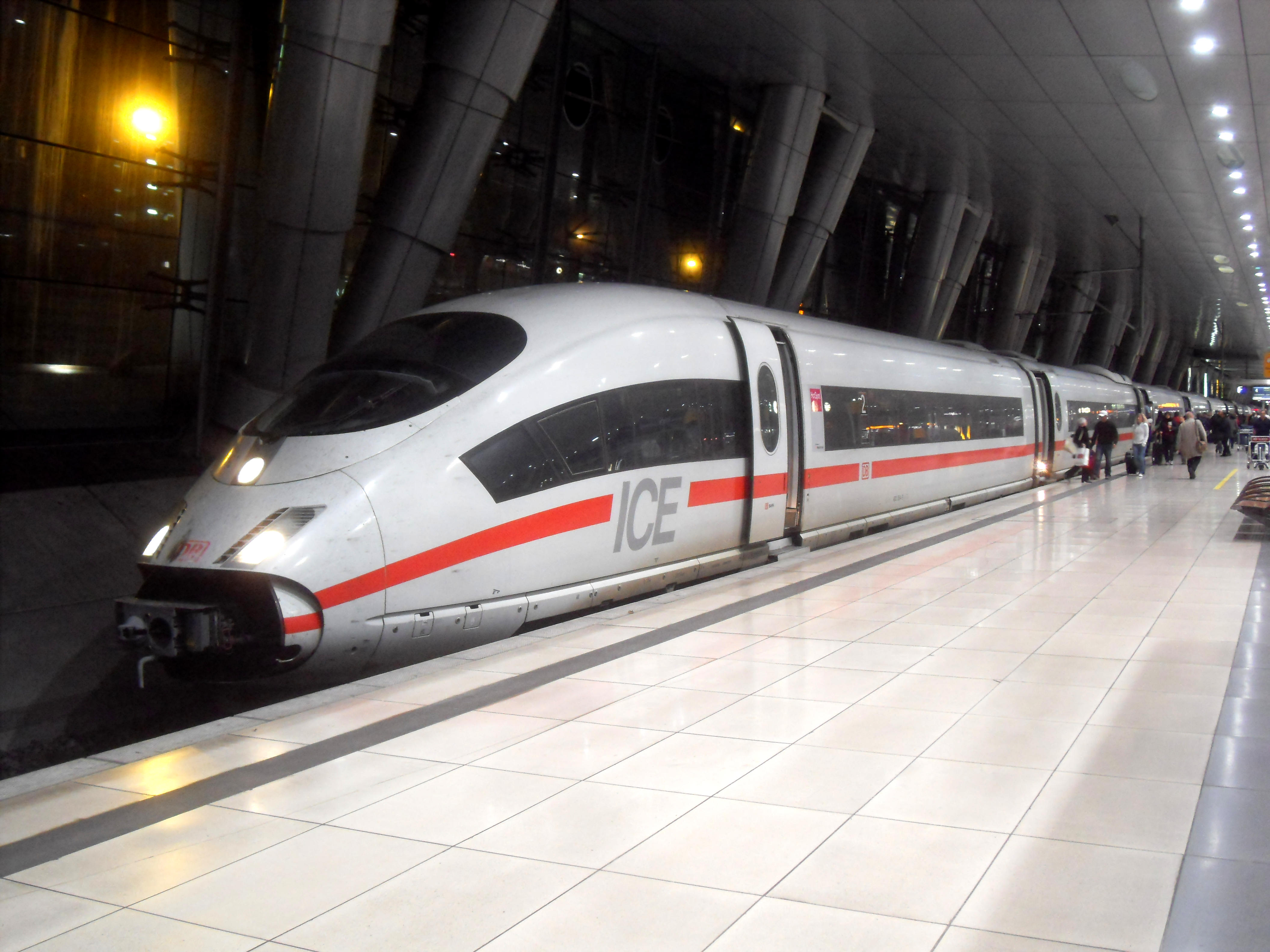 ICE 3 (Tz 354) im Fernbahnhof des Frankfurter Flughafens in Hessen (Deutschland)